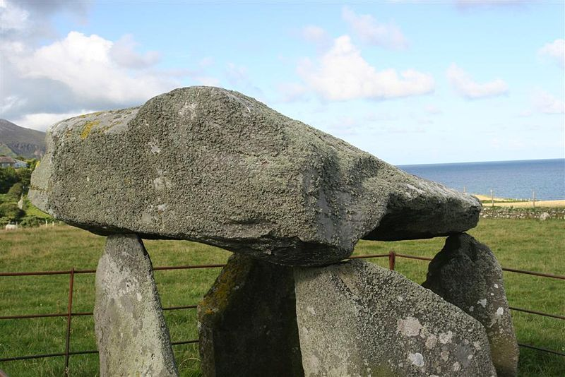 Bachwen burial chamber, Clynnog Fawr, Gwynedd